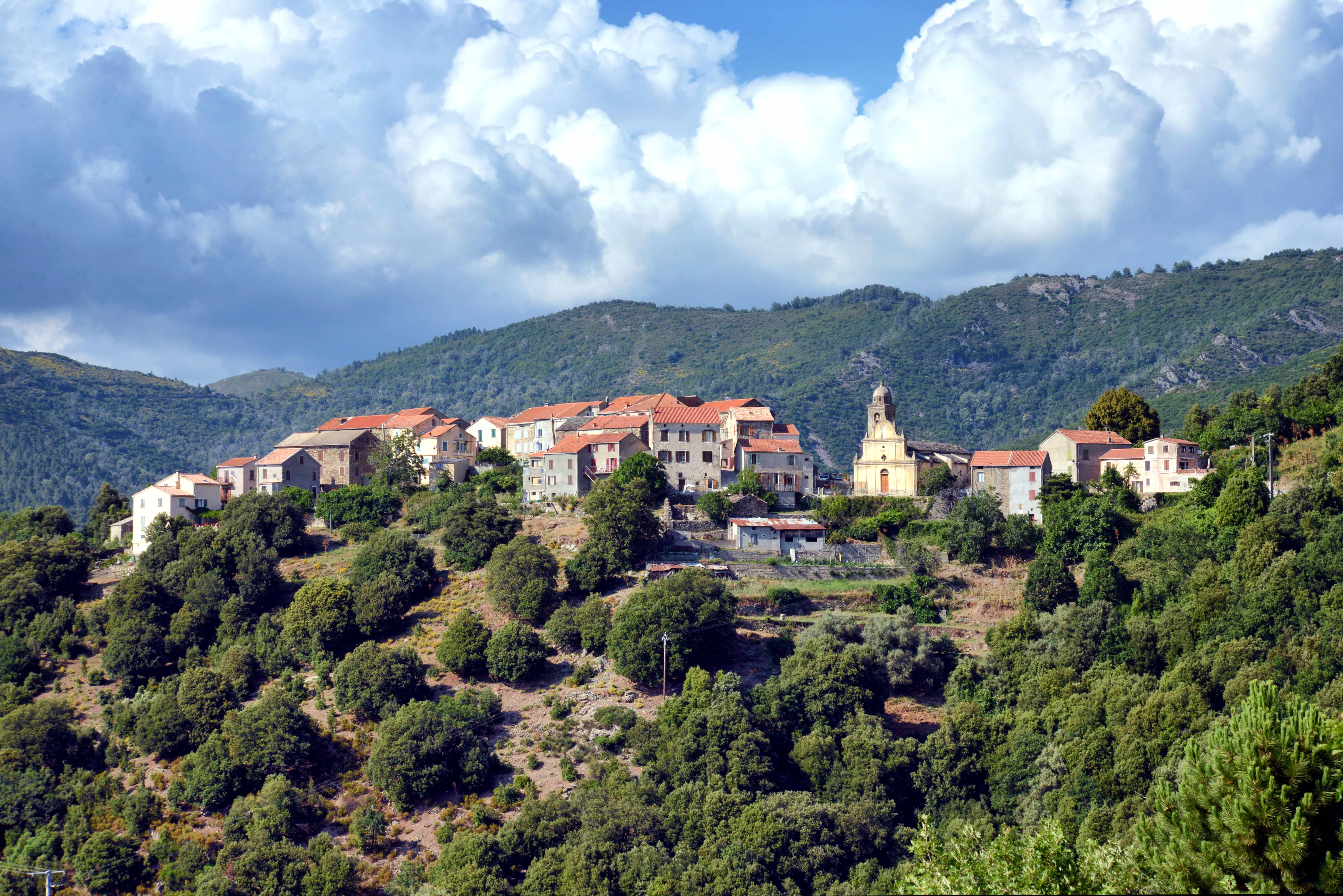 Focicchia (Corse) - Vue du village